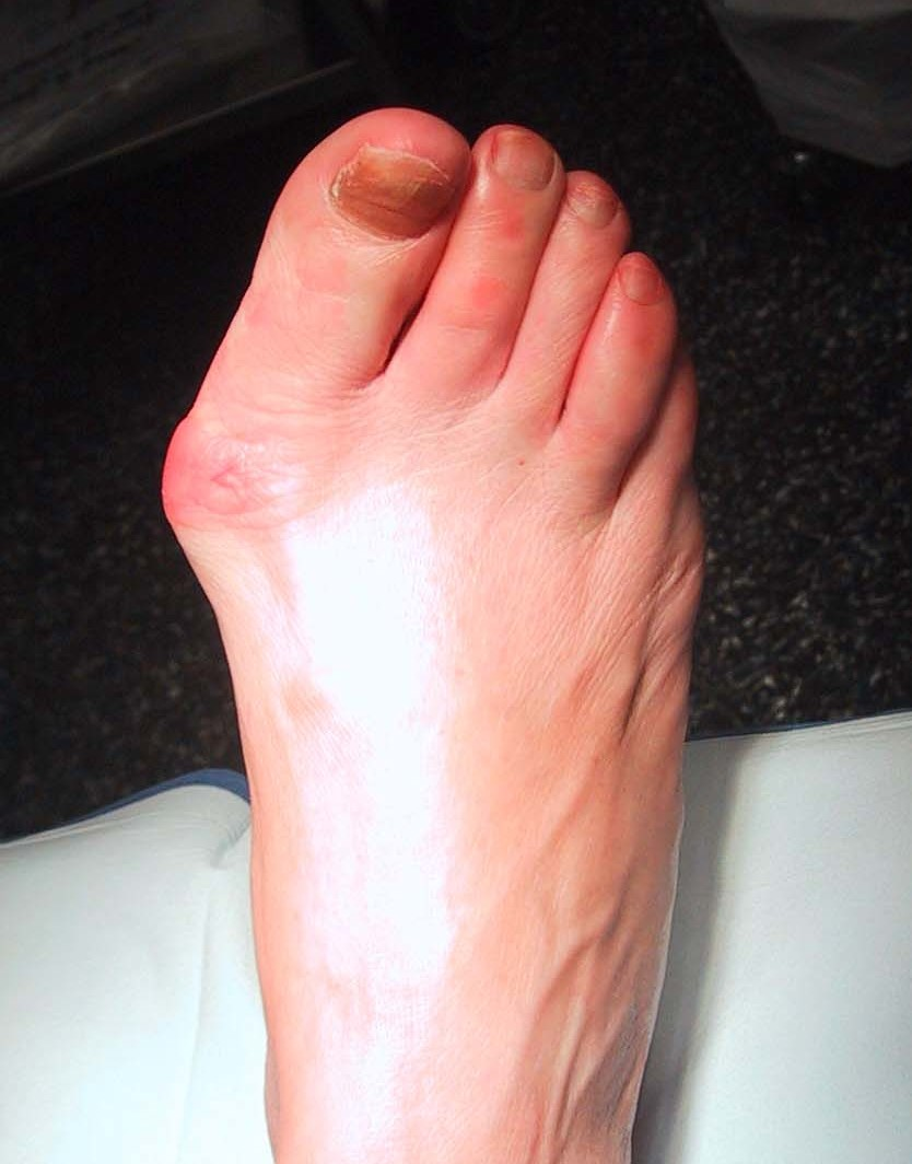 Dr Henri Lelièvre (Hallux valgus, Bunion)